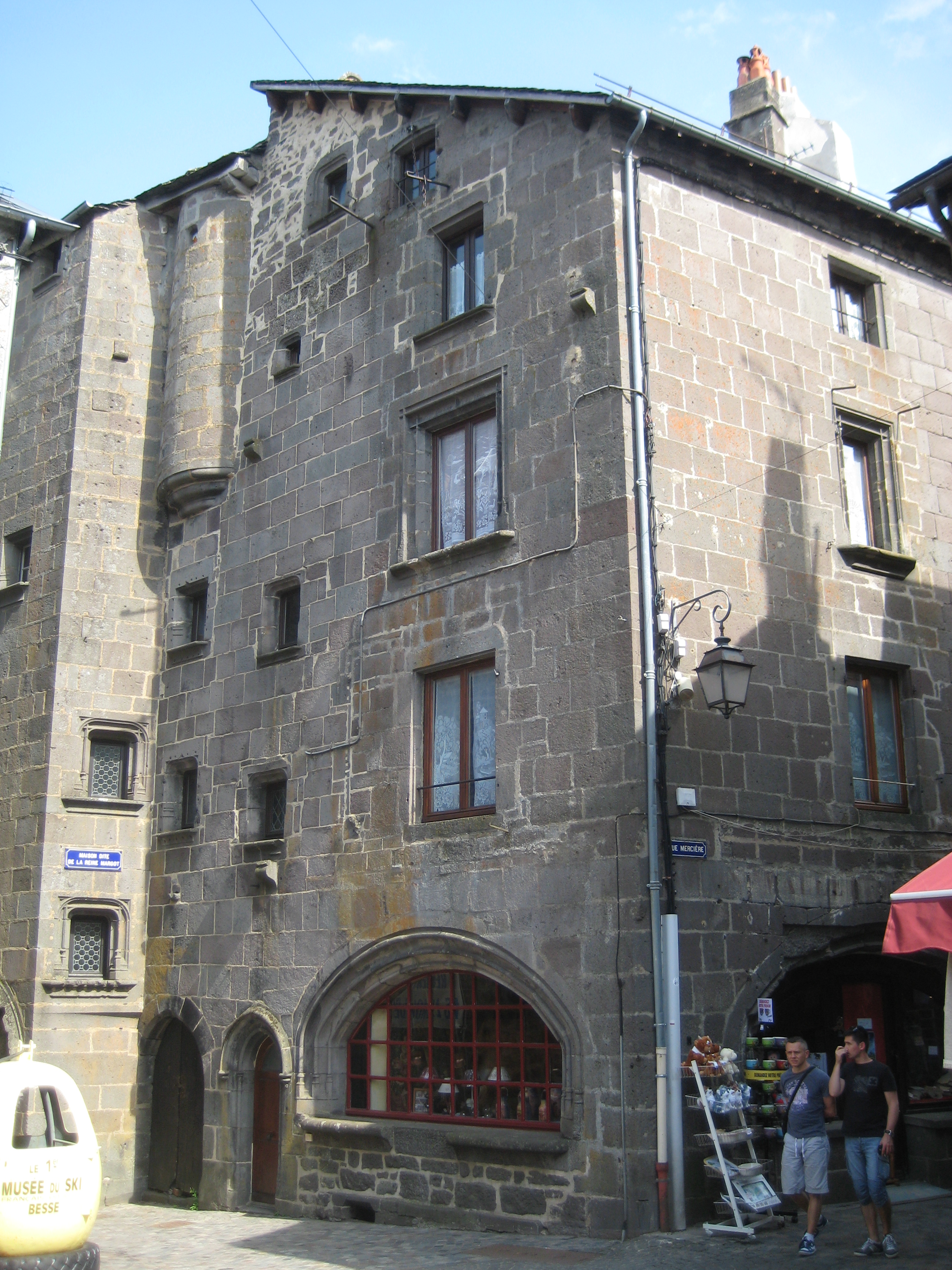 Maison dite de la reine margot, Besse